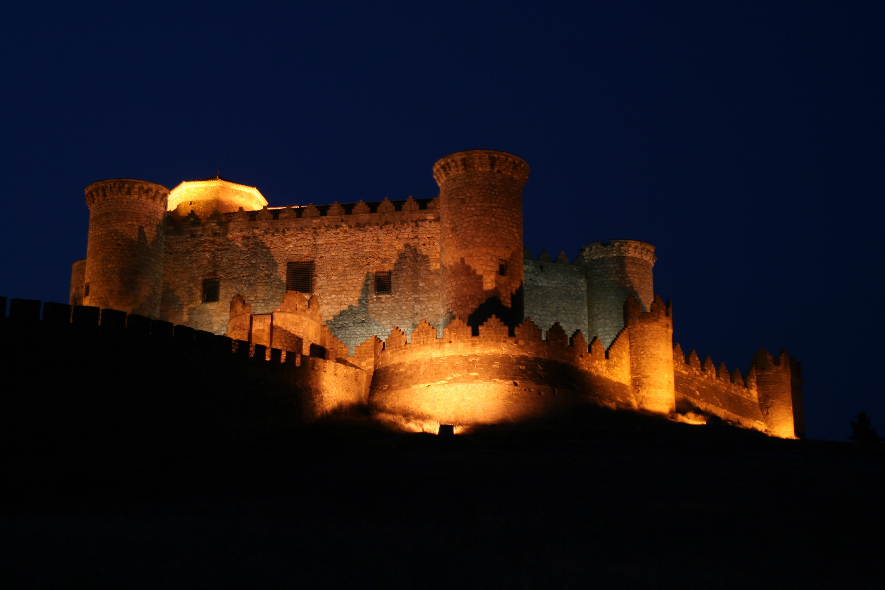 Vista nocturna del castillo y la muralla desde la cuesta del castillo